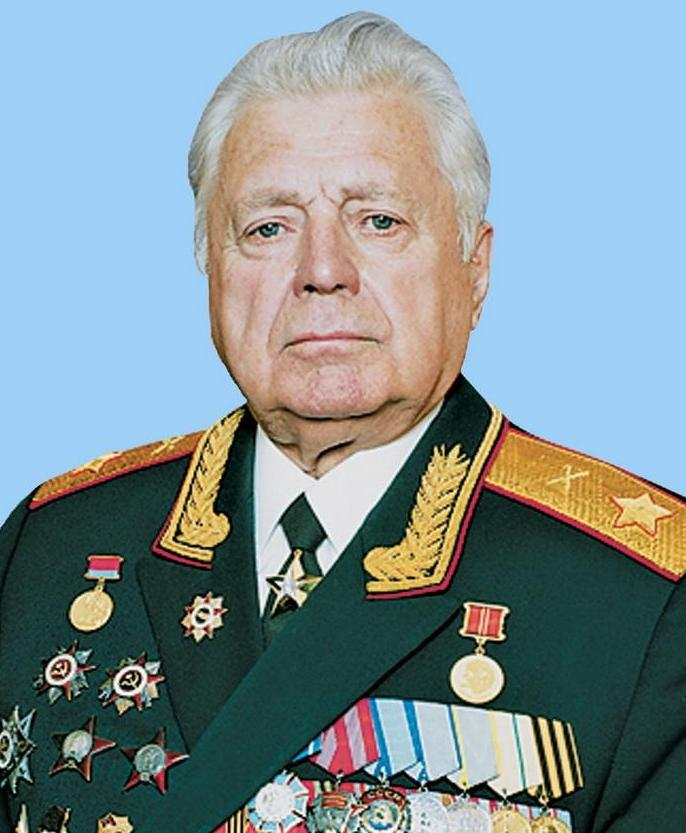 Маршал артиллерии Владимир Михайлович Михалкин